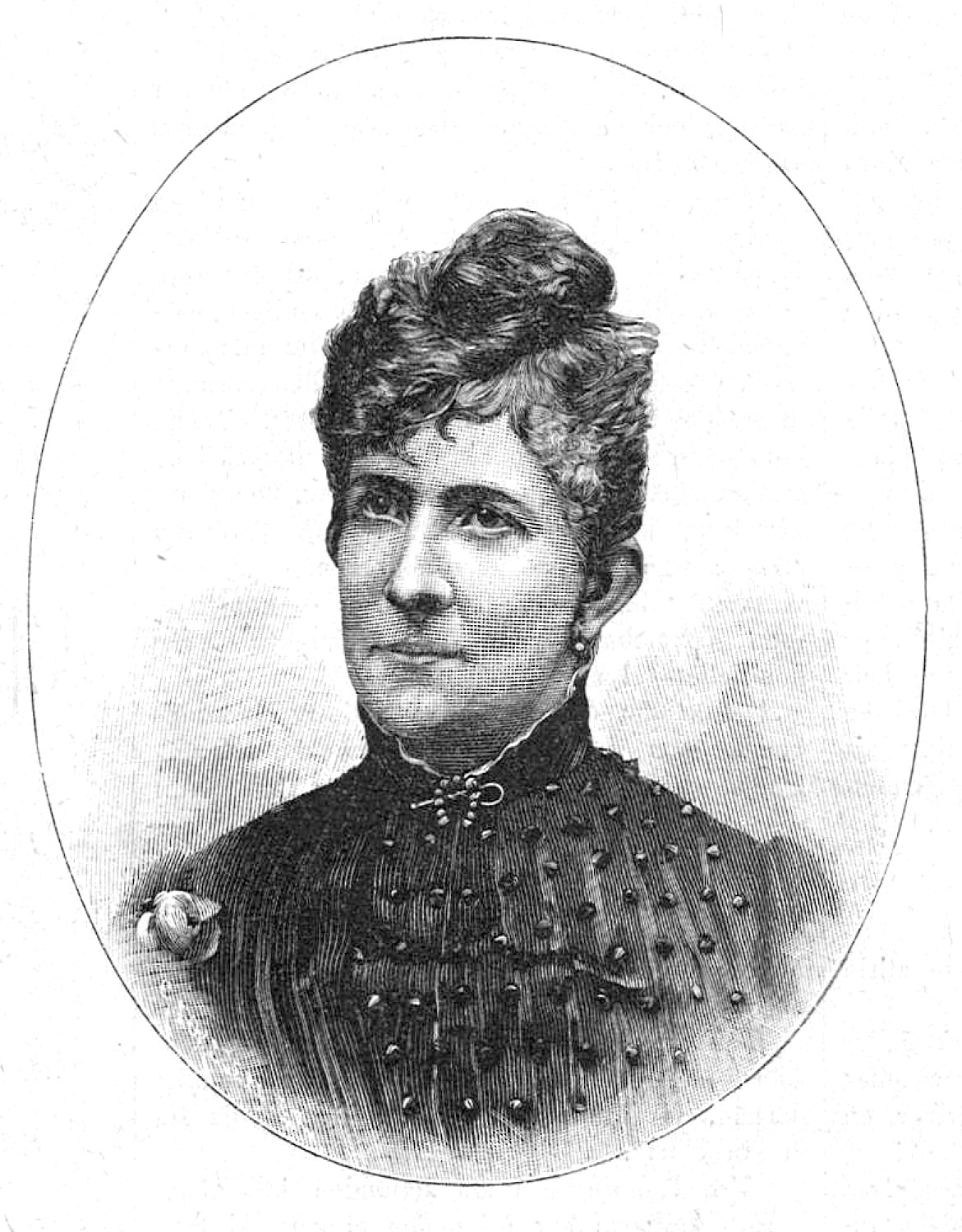 Betty Henning (1850-1939)